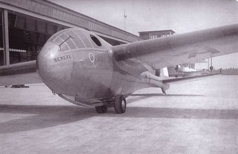 Rotter Lajos által tervezett "Nemere" gép